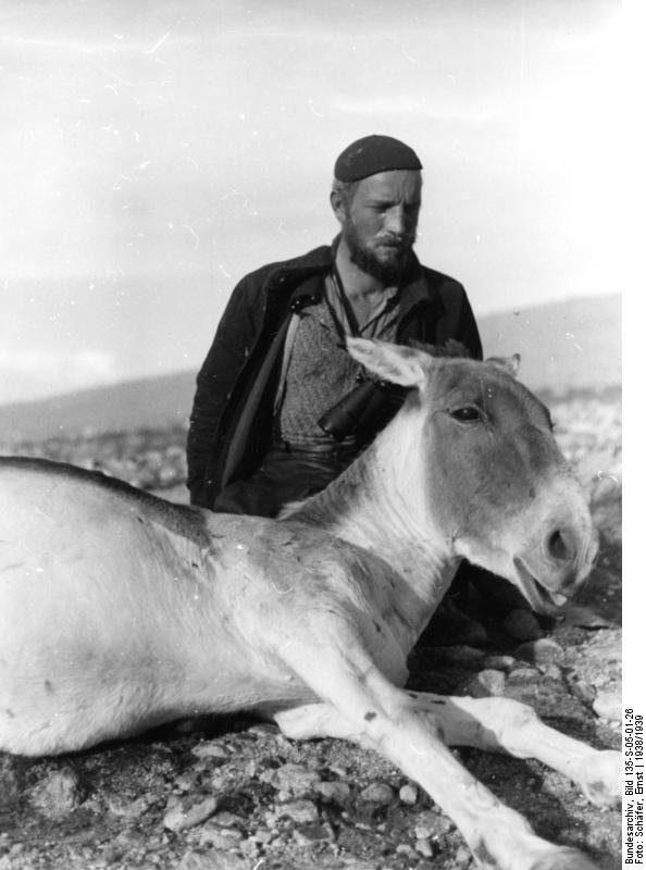 Kianglager, Wienert mit Kianghengst